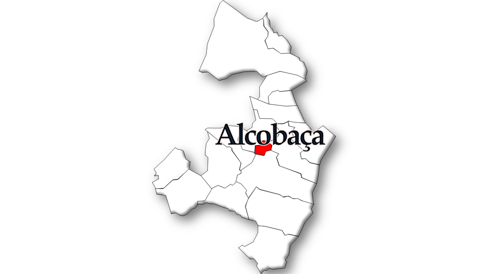 População